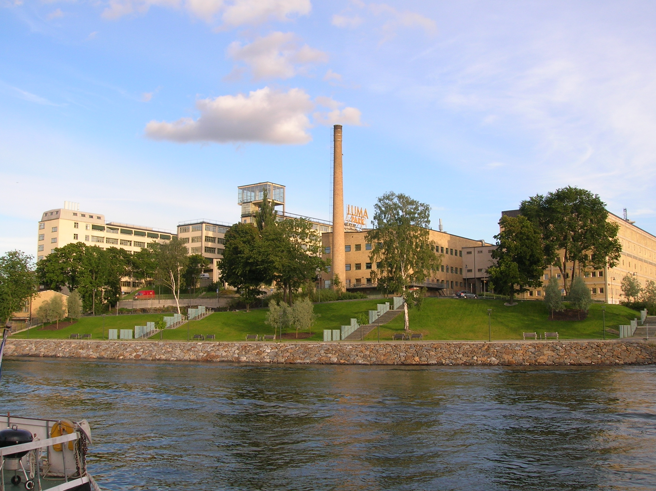 Luma industriområde (or Luma park), once famous for its production of lightbulbs, Södra Hammarbyhamnen, Stockholm